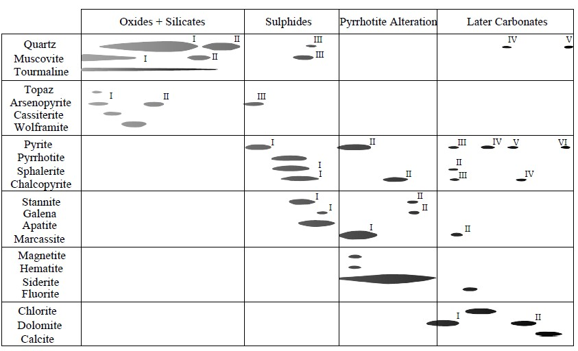 Paragénese